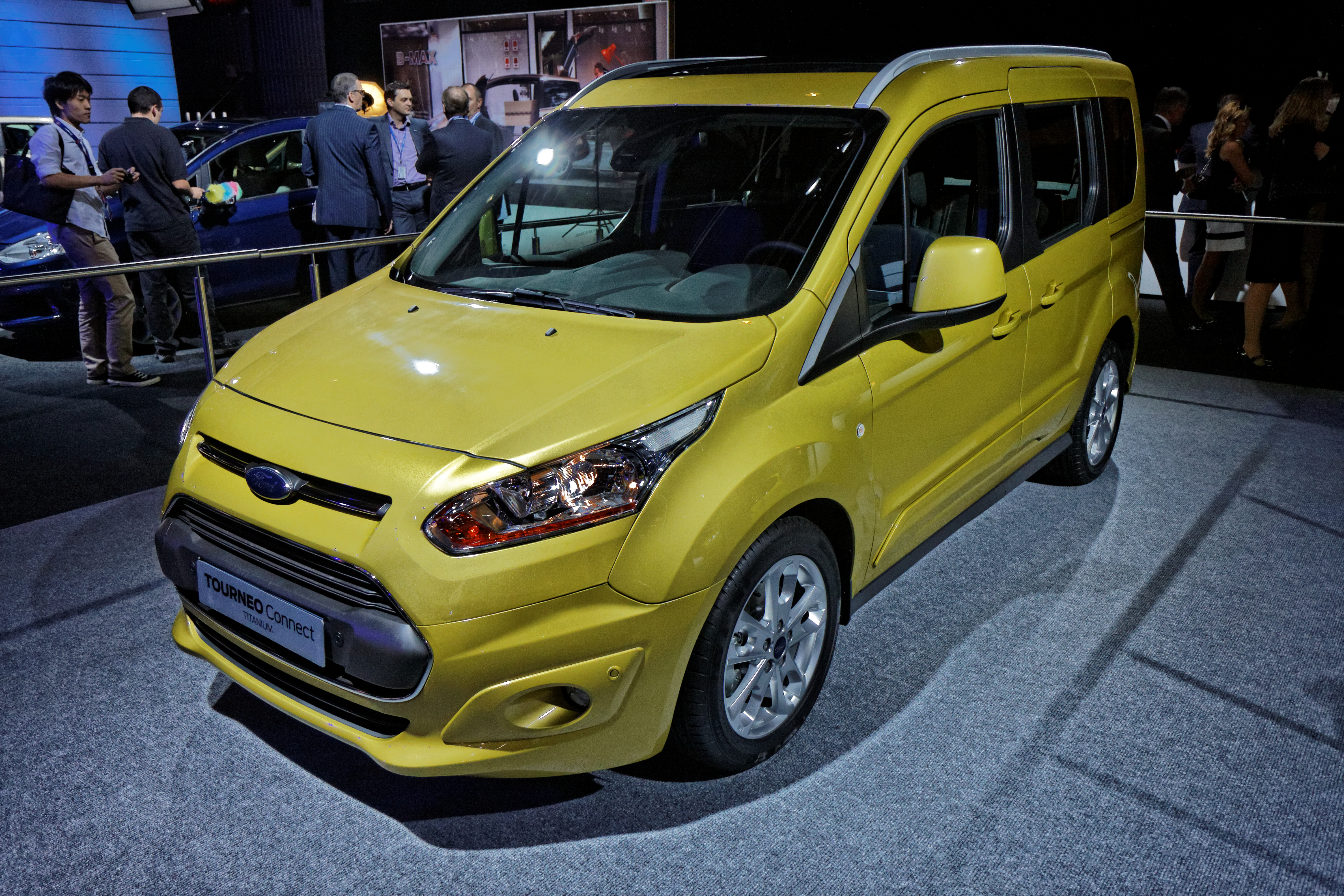 Le Ford Tourneo Connect présenté lors du Mondial de l'Automobile 2012.